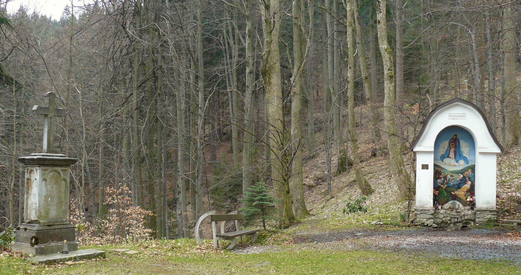 Kościół Maria Hilf nieopodal Zlatych Hor. Krucyfiks i studzienka.